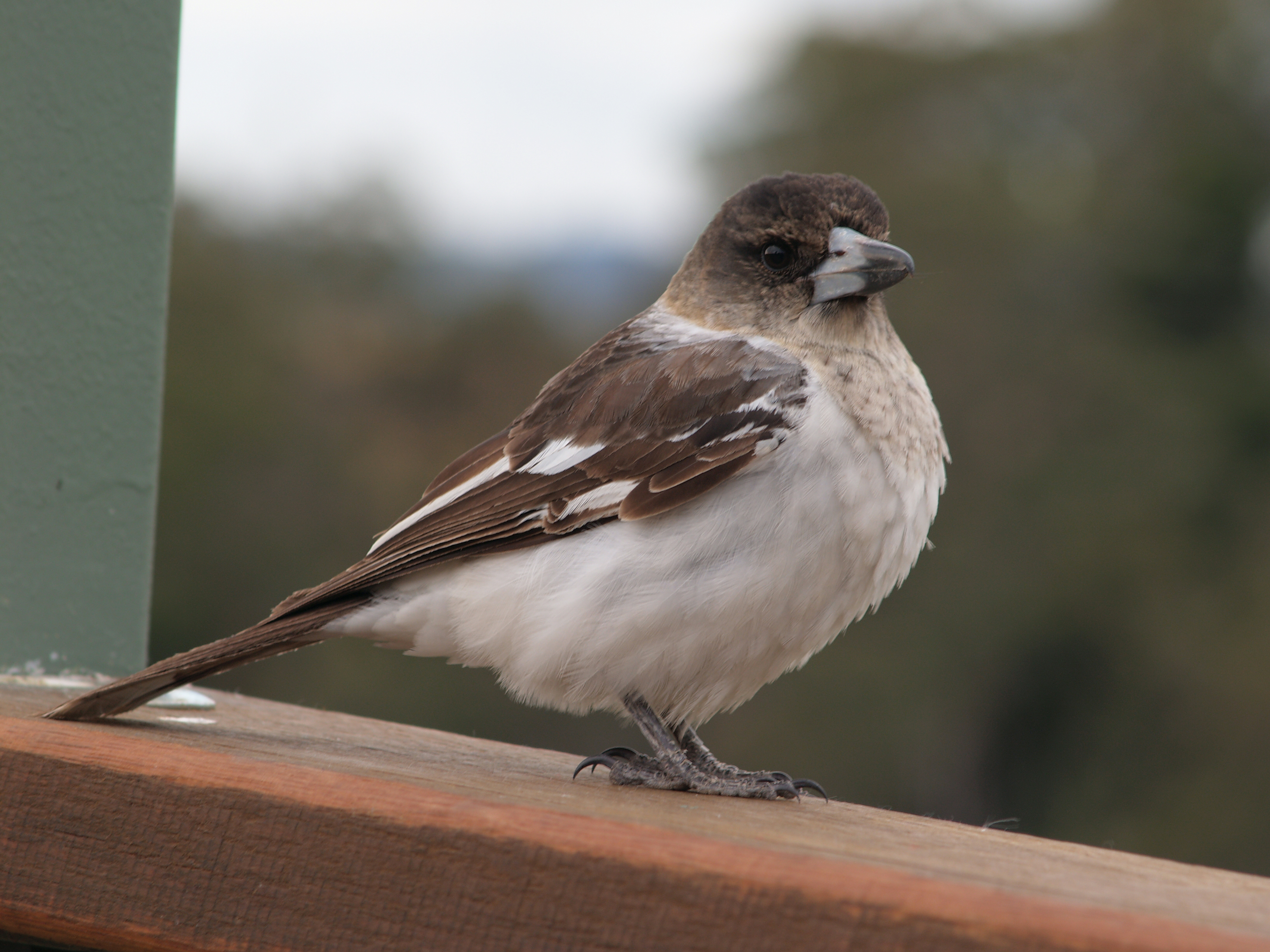 Cracticus nigrogularis